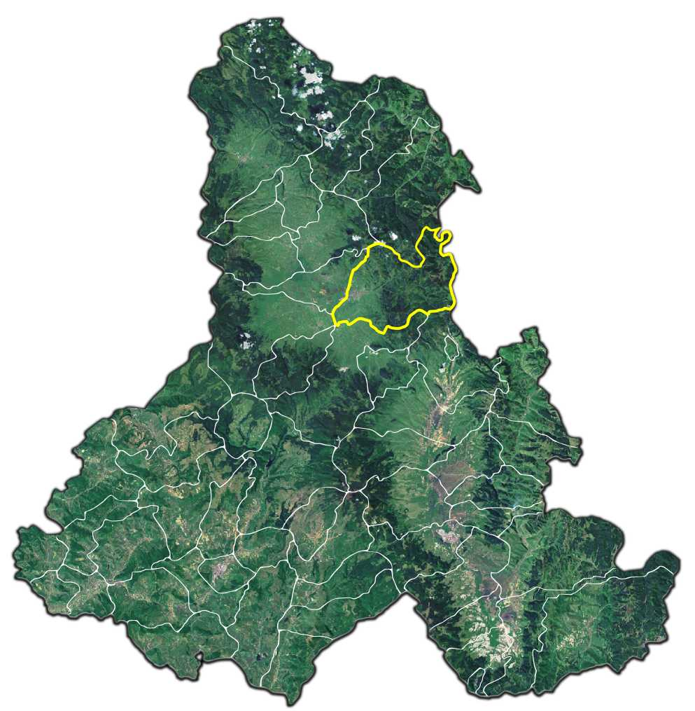 Gheorgheni jud Harghita